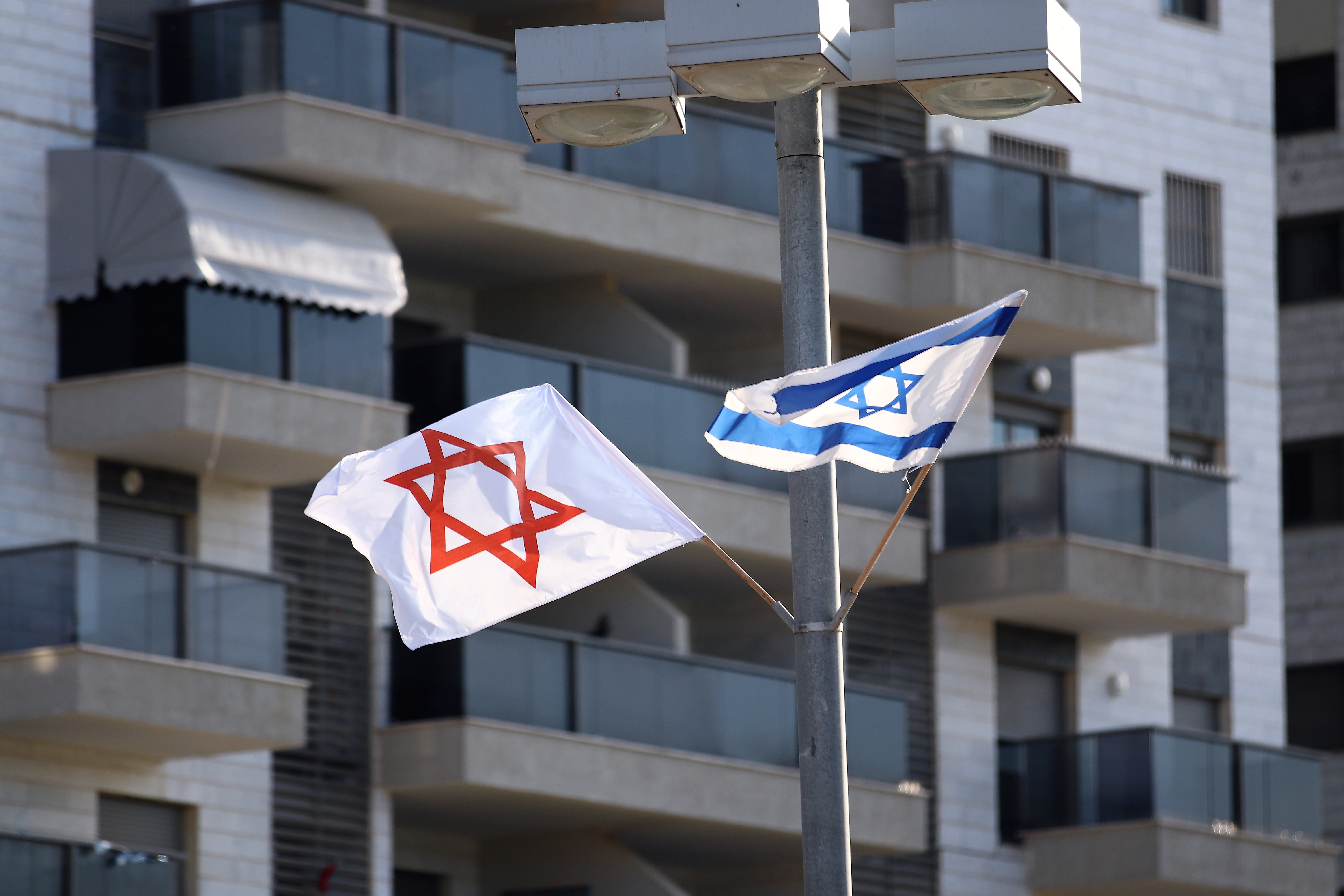 ברחובות בית שמש הונפו דגלי מד"א לצד דגלי ישראל כאות מחווה למד"א הודות לעזרתה בתקופת הקורונה